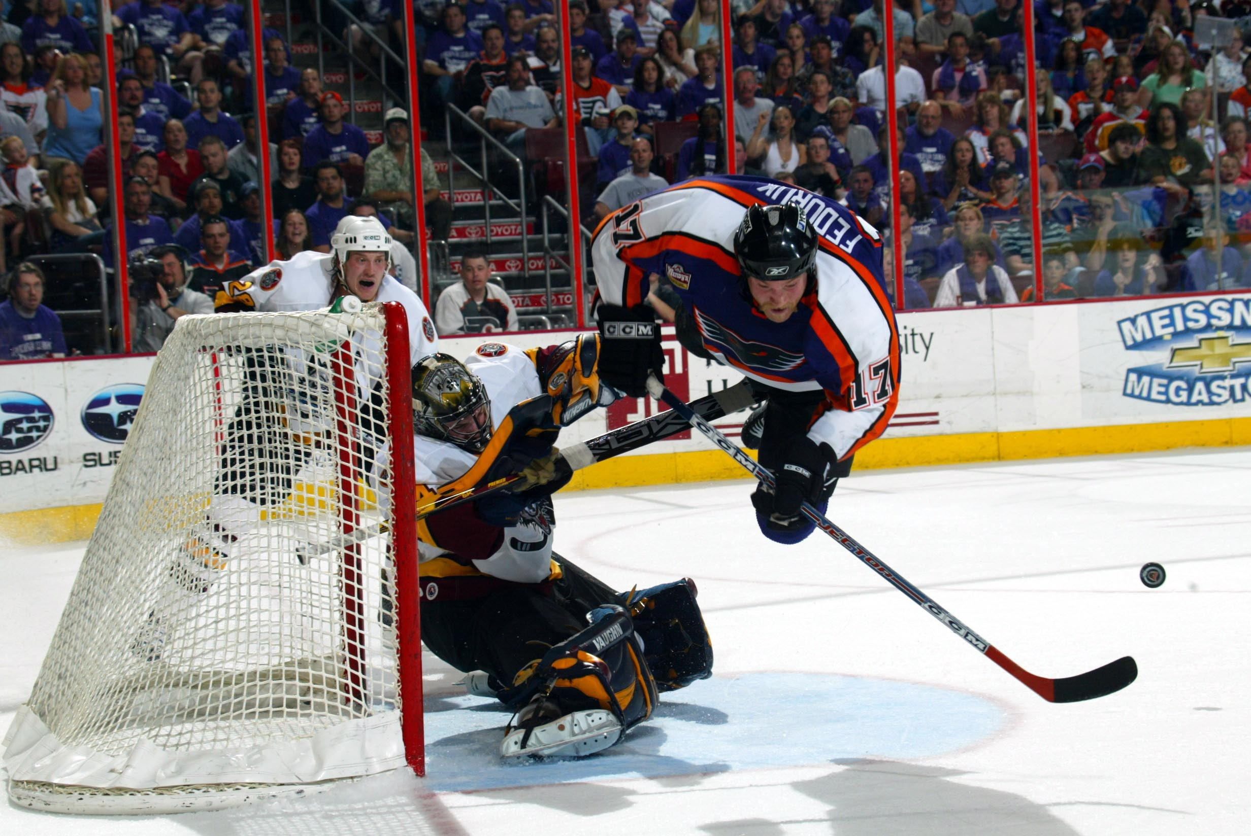 Photo: Bruce Bennett/AHL